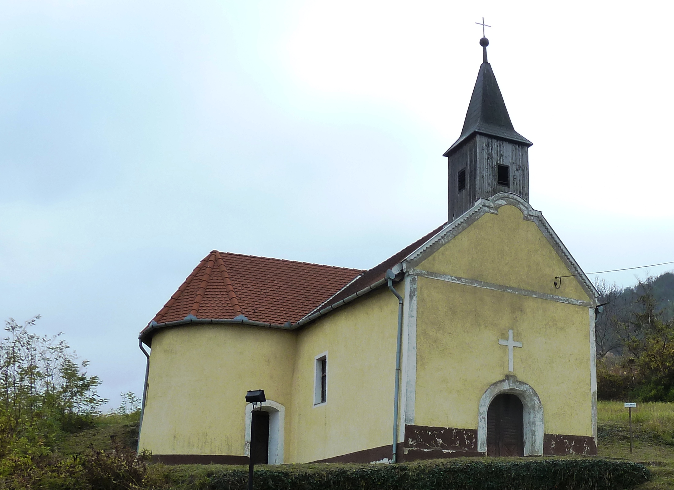 Szent Márton kápolna a Somló hegy lábánál (Magyarország, Veszprém megye)